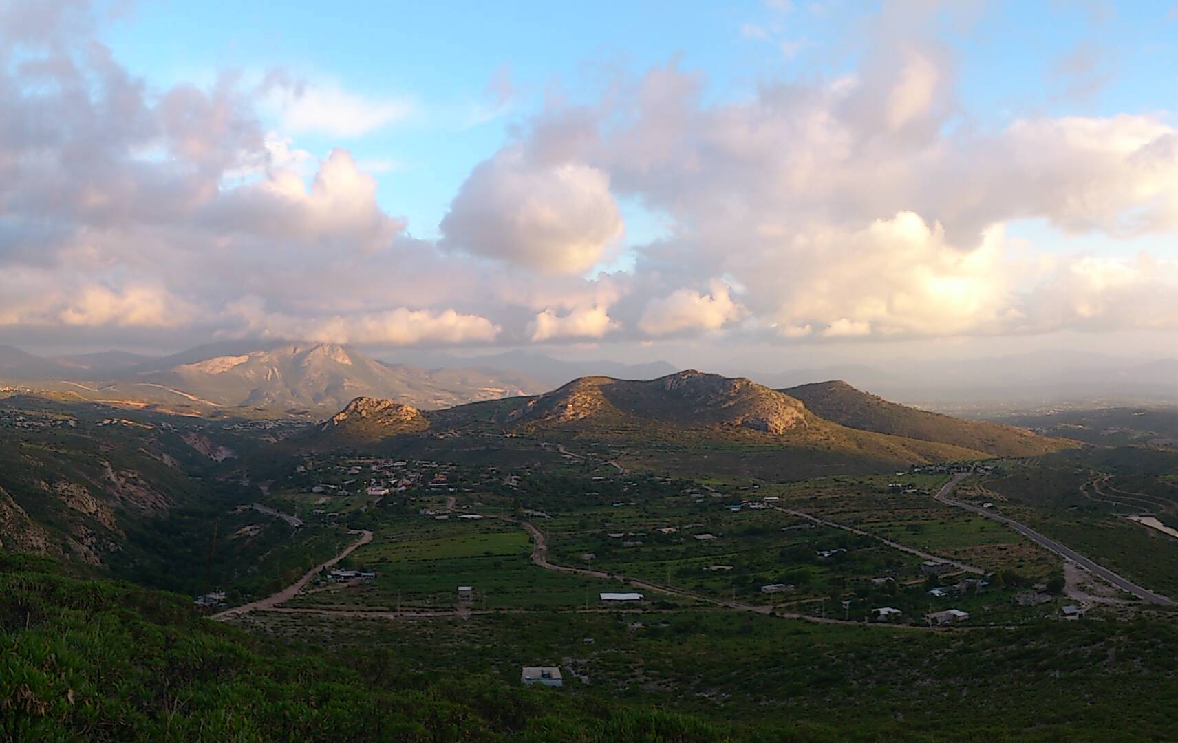 Imagen tomado 2014